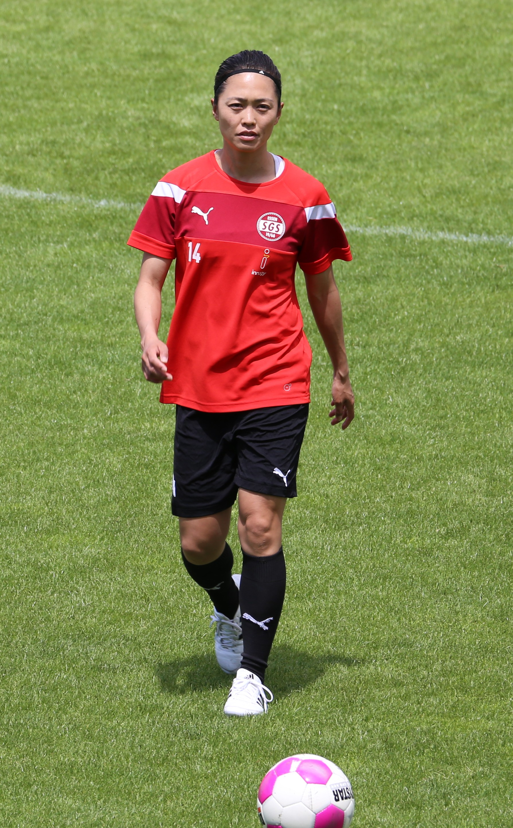 Kozue Andō (SGS Essen) beim Aufwärmen vor dem Frauen-Bundesliga-Spiel FC Bayern München gegen SGS Essen am 21. Mai 2017 im Stadion an der Grünwalder Straße (Ergebnis war 2:0)